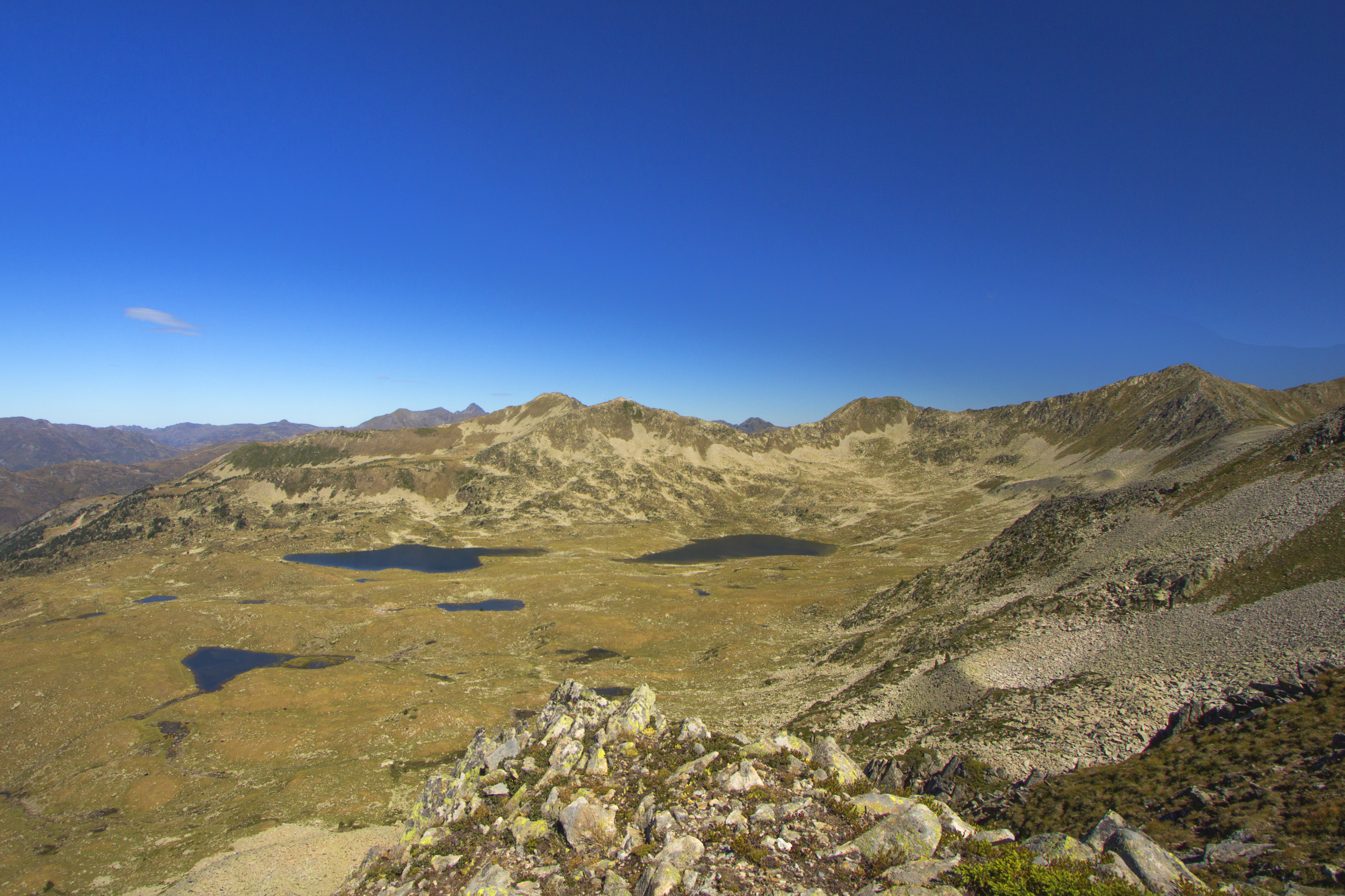 Circ de Baciber des del Pic del Rosari, Alt Àneu (Pallars Sobirà)